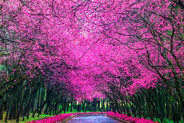 中文（台灣）: 南投魚池鄉